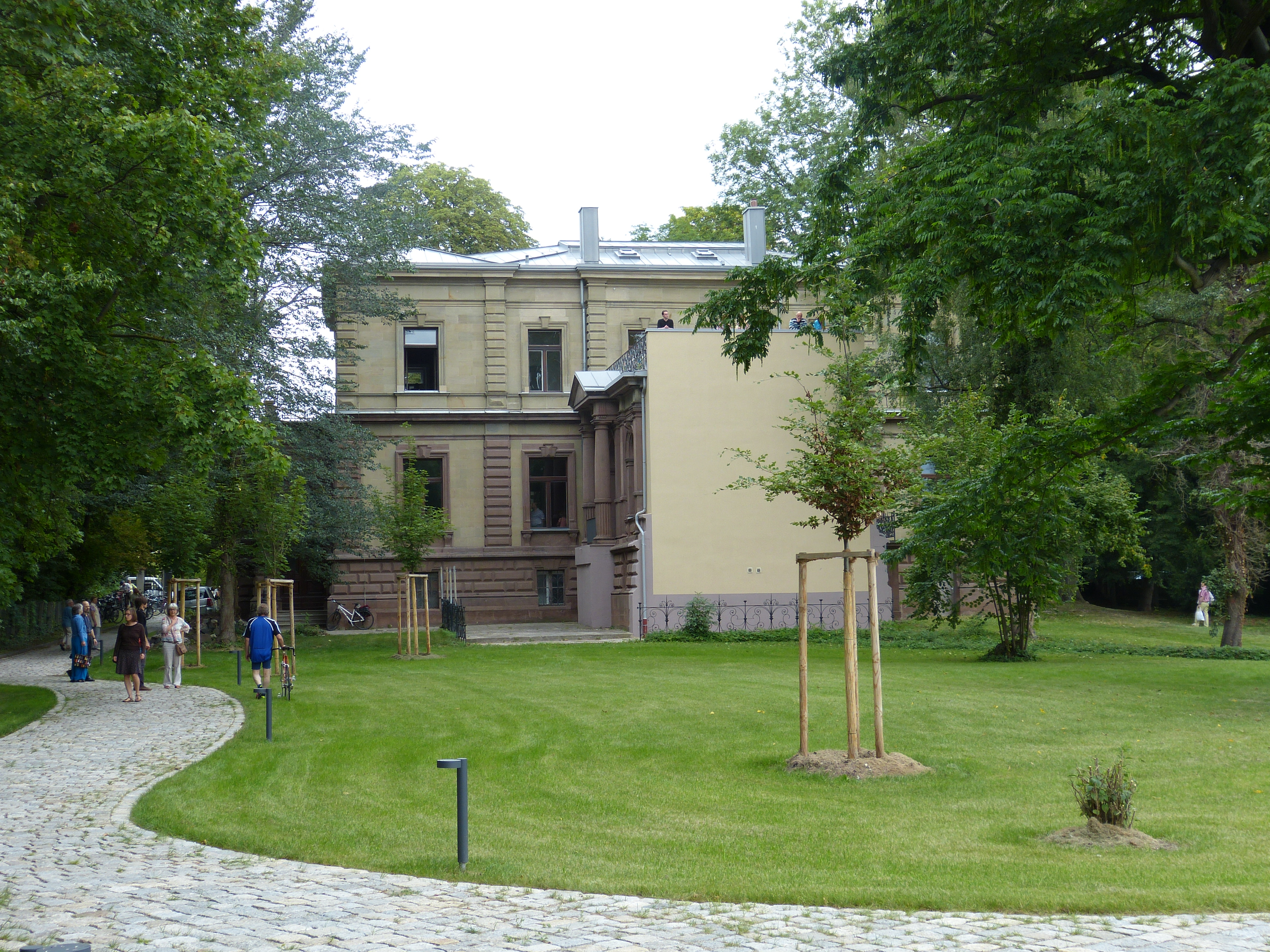 Die Villa Haag in Augsburg.